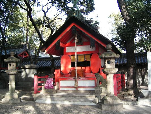 住吉大社内の船玉神社。